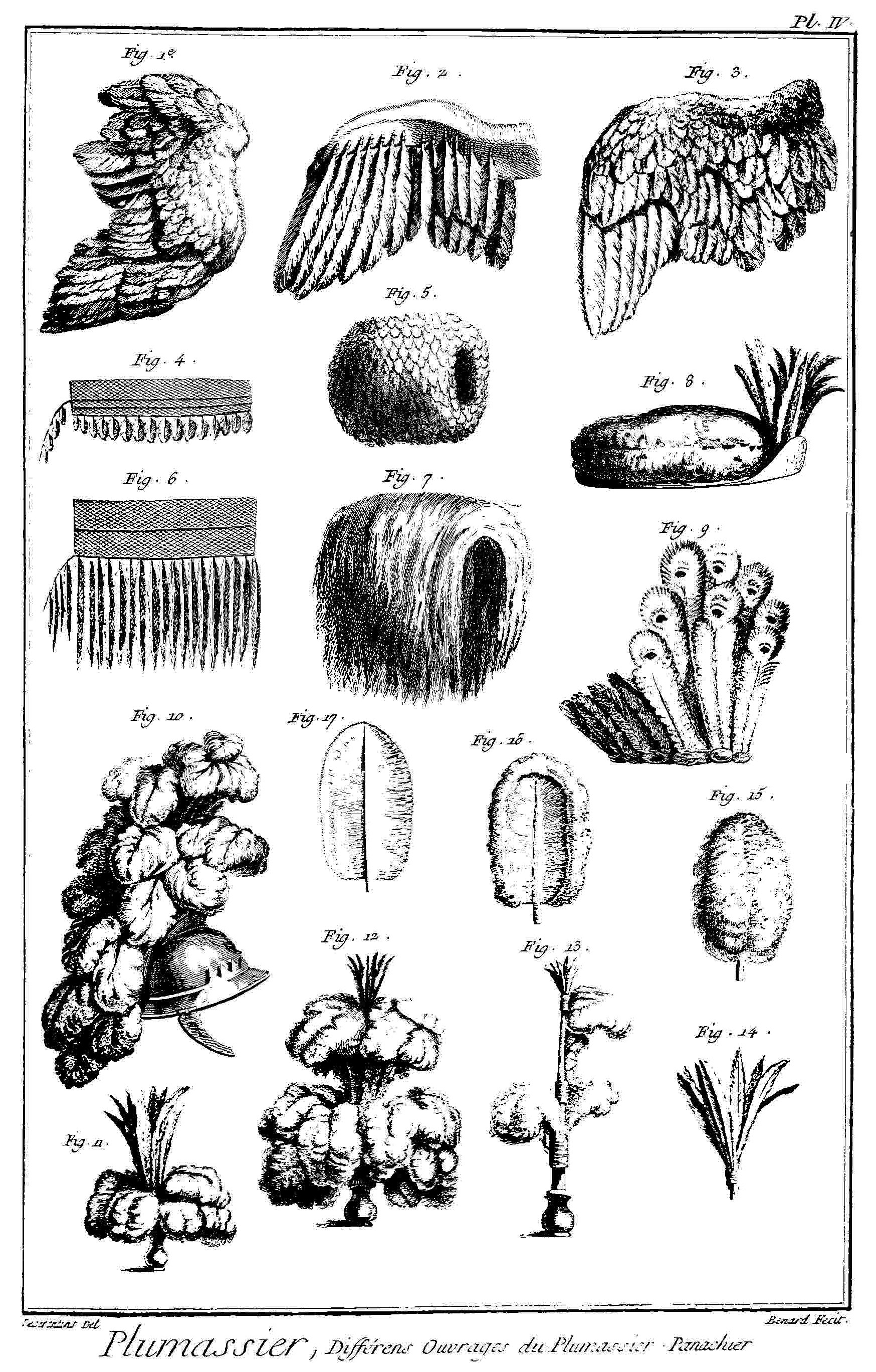 Différents ouvrages du plumassier-panachier XVIIIe siècle